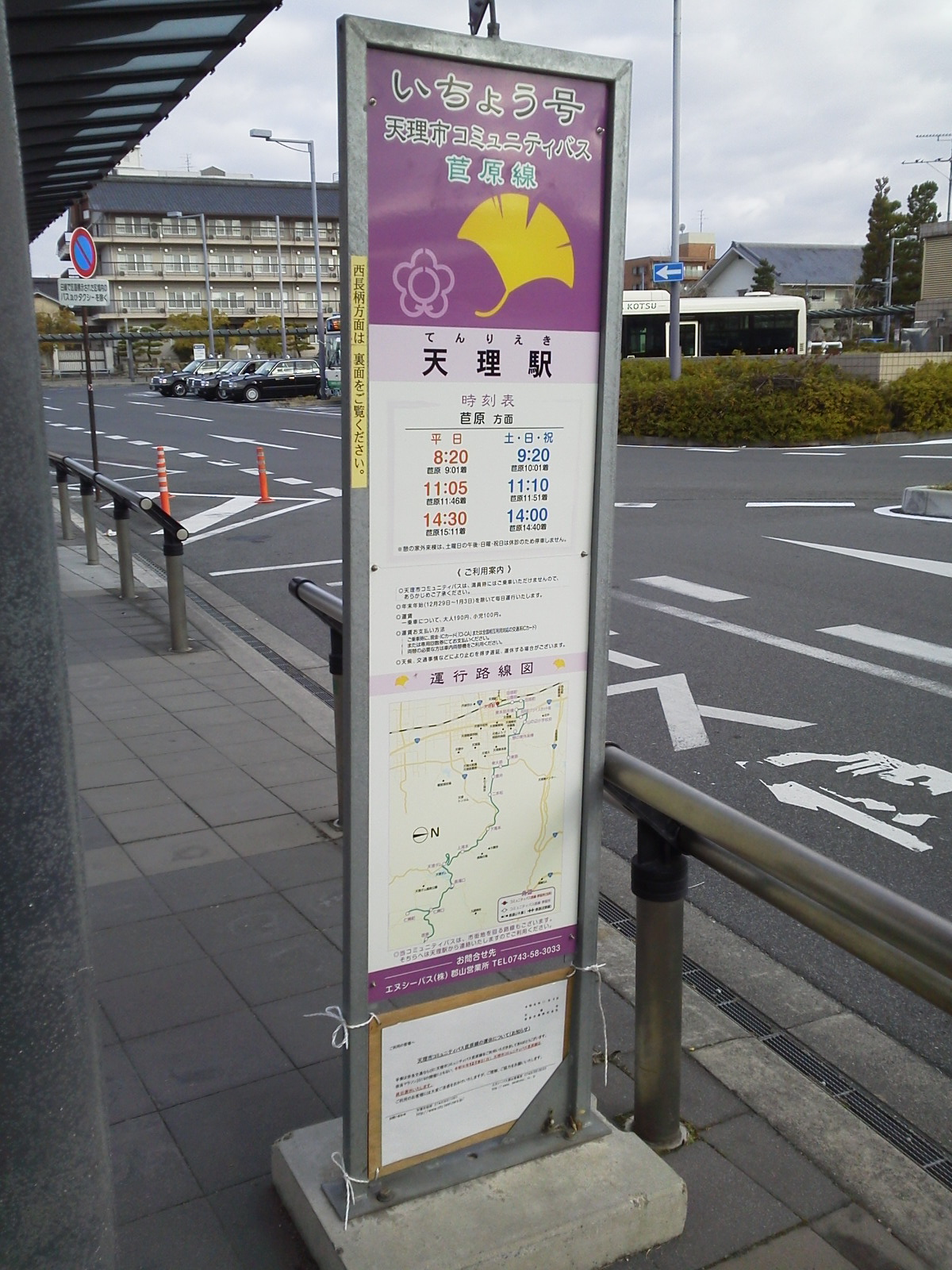 Tenricity communitybus